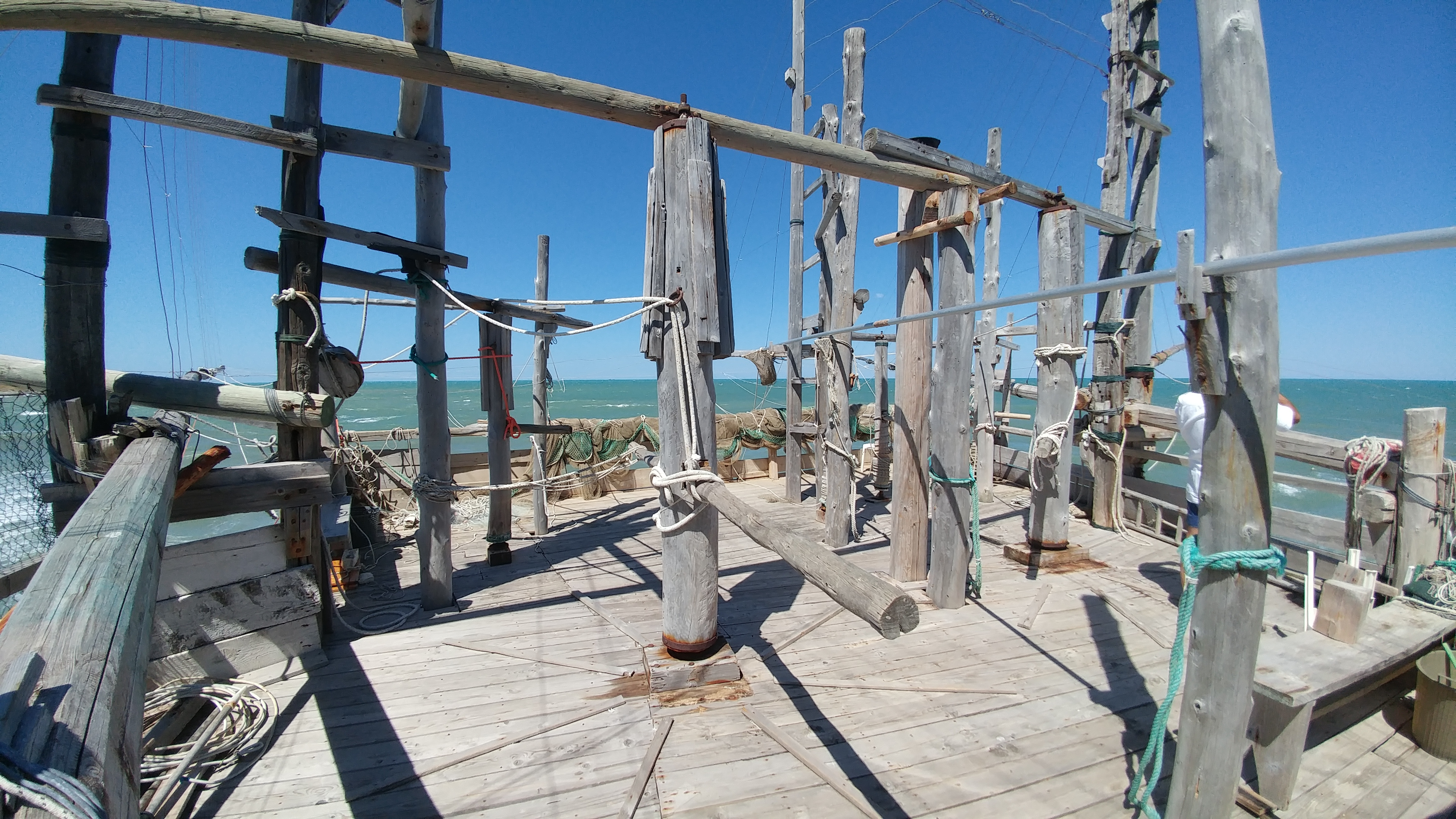 Il sistema di argani, tiranti e reti che mette in funzione un Trabucco